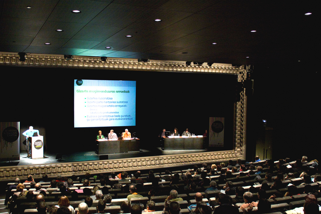 Topagunearen Kongresua, 2011ko otsaila